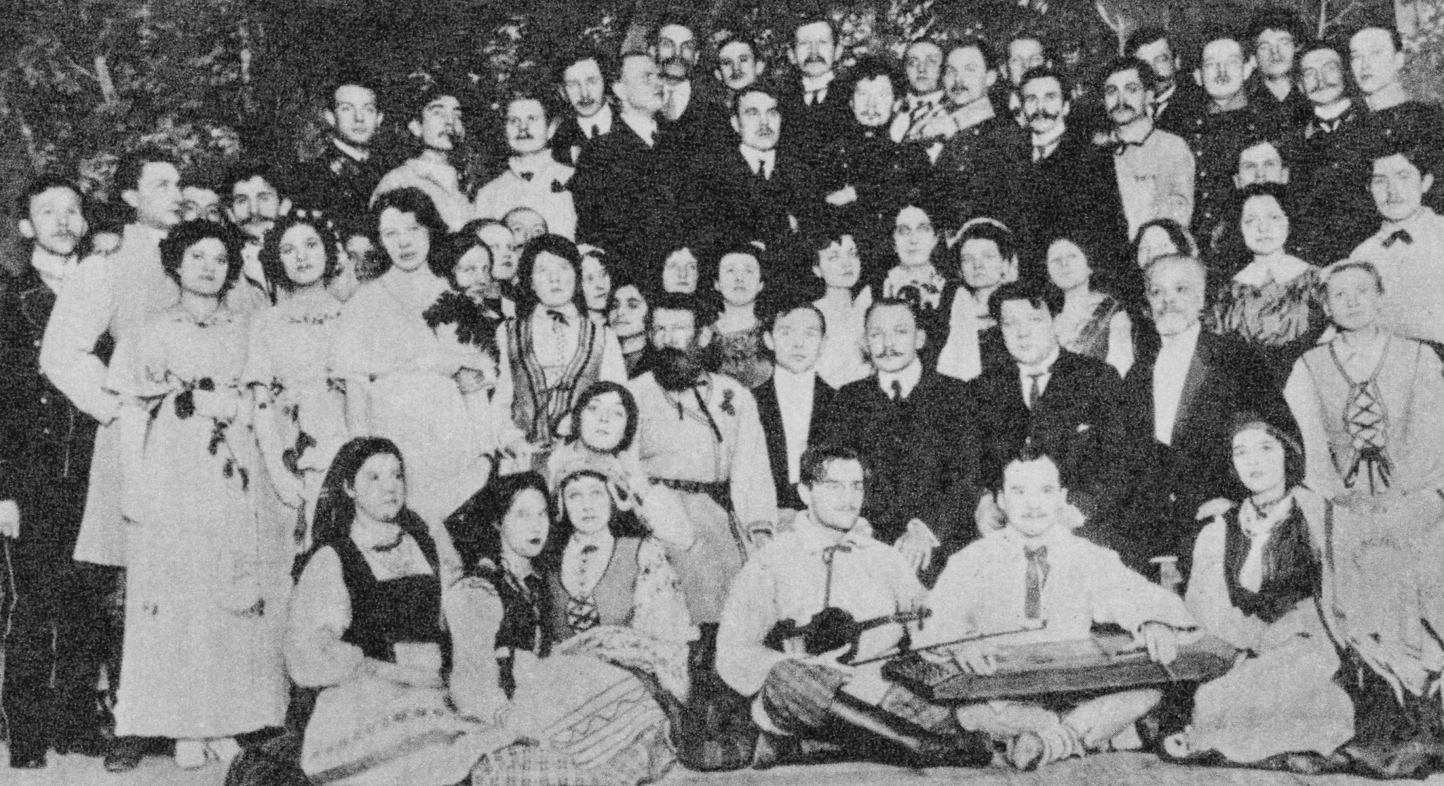 Беларуская (тарашкевіца): Янка Купала сярод сябраў беларускага літаратурна-навуковага гуртка студэнтаў Санкт-Пецярбургскага ўнівэрсытэту пасьля другой пастаноўкі п’есы «Паўлінка»